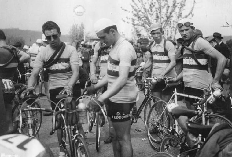 Friedensfahrt, italienische Mannschaft. Illus CSR 7.5.1951 Friedensfahrt Prag-Warsawa vom 30.4.-9.5.1951 Am 1.5.1951 wurde im großen Radrennen Prag-Warsawa die 2. Etappe gefahren. Dieses Radrennen ist ein Beitrag zum Frieden und stärkt die Internationale Solidarität der Werktätigen in der Welt. UBz: Die Italienische Mannschaft kurz vor dem Start zur 2. Etappe. Leihweise Illus Berlin ws Information added by Wikimedia users.*